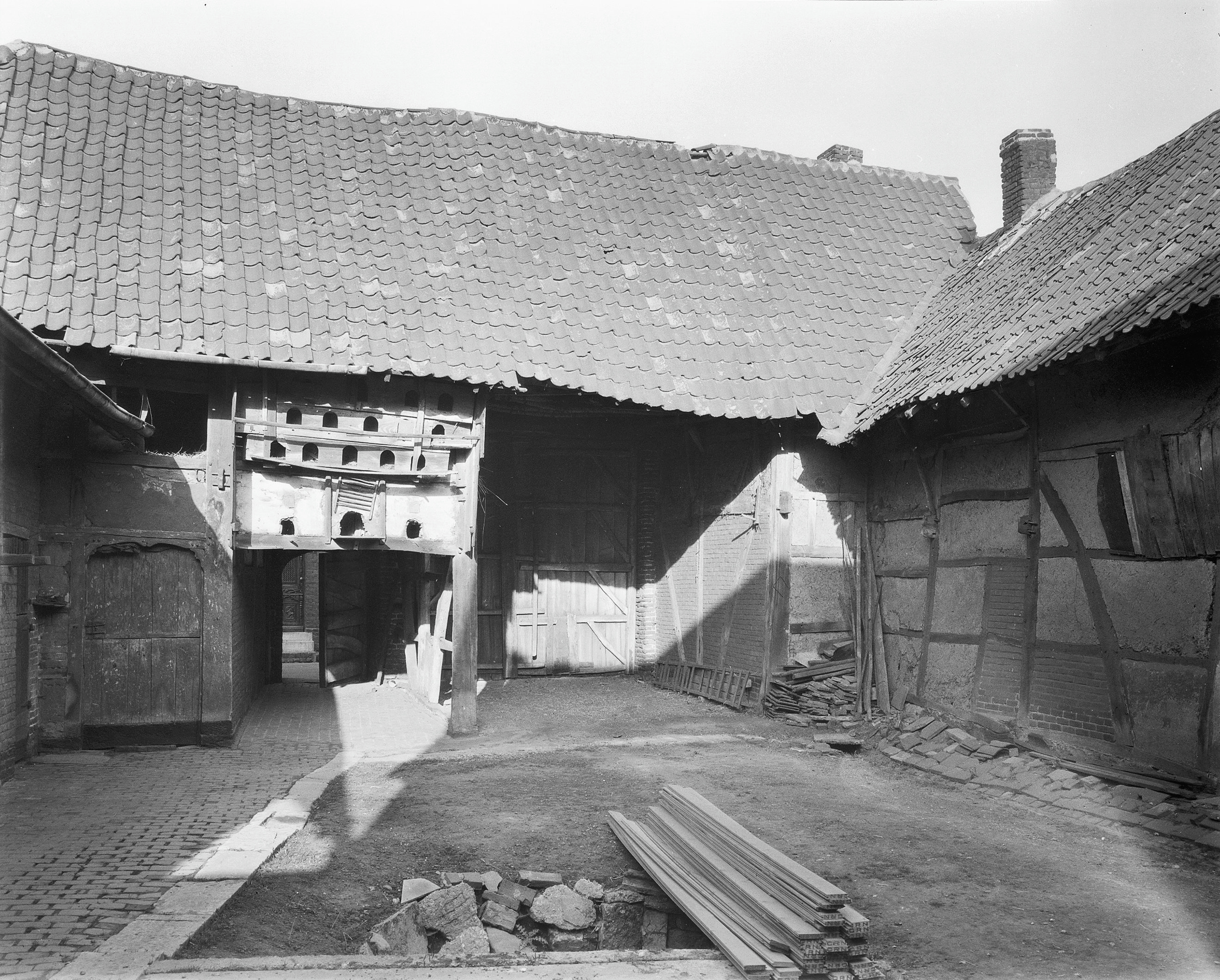 Vakwerkhoeve: Hoeve, binnenplaats